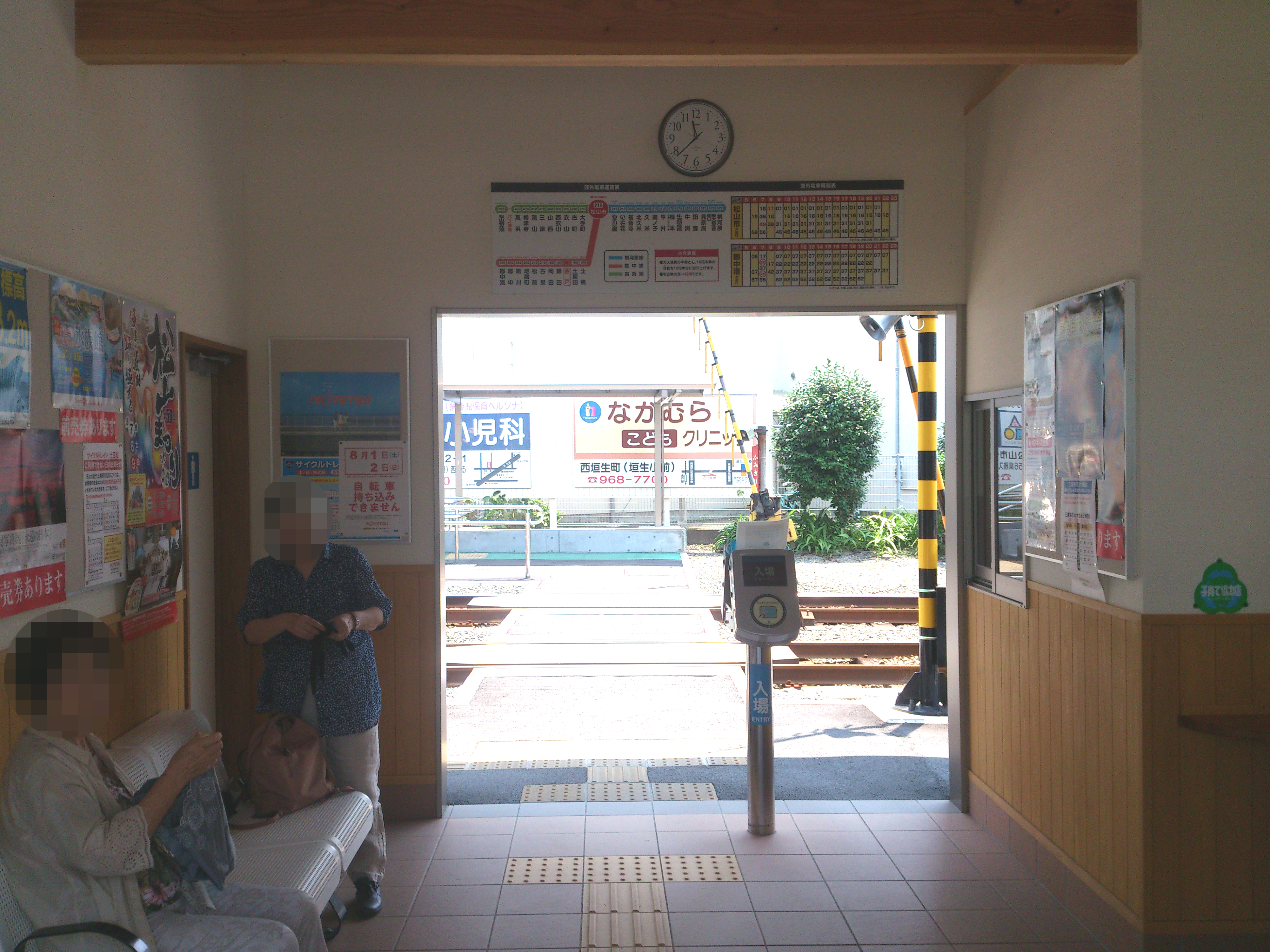 伊予鉄道 余戸駅の駅舎内です。